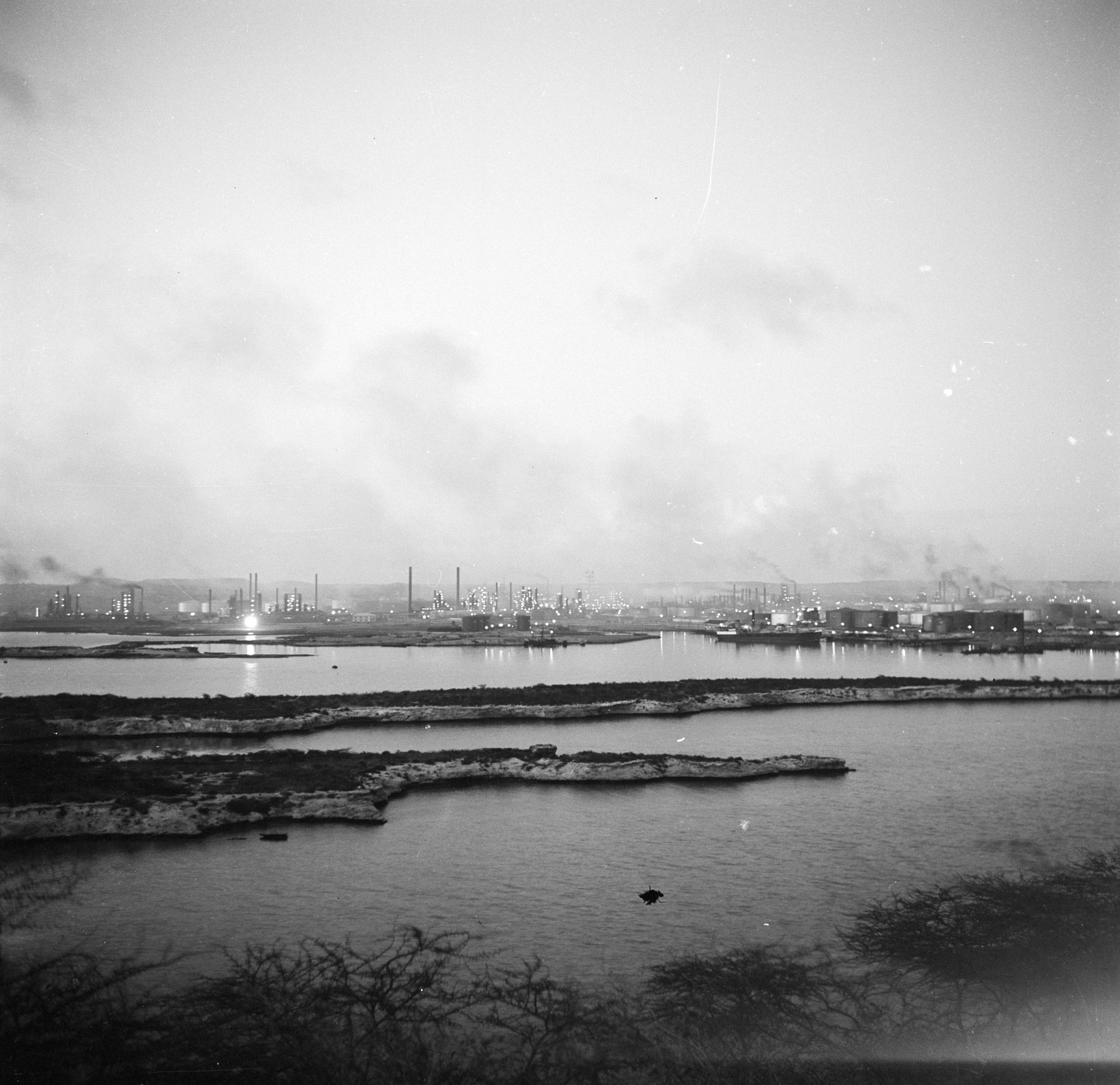 Collectie / Archief : Fotocollectie Van de Poll Reportage / Serie : Reis naar Suriname en de Nederlandse Antillen Beschrijving : De olieraffinaderij CPIM aan het Schottegat op Curaçao bij avond Datum : 1947 Locatie : Curaçao Trefwoorden : raffinaderijen Instellingsnaam : CPIM Fotograaf : Poll, Willem van de, [onbekend] Auteursrechthebbende : Nationaal Archief Materiaalsoort : Negatief (zwart/wit) Nummer archiefinventaris : bekijk toegang 2.24.14.02 Bestanddeelnummer : 252-7828